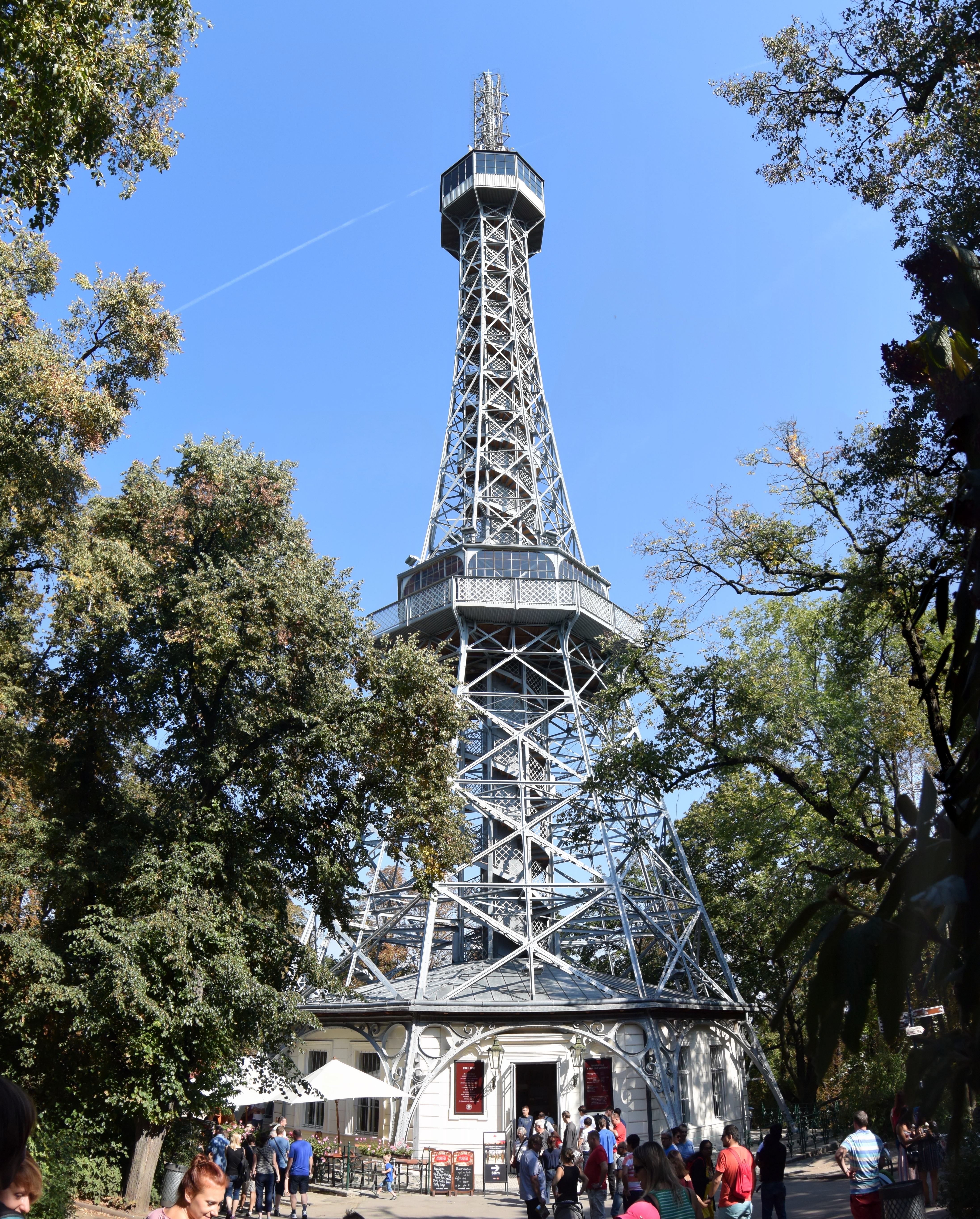 Petřínská rozhledna ze září 2016